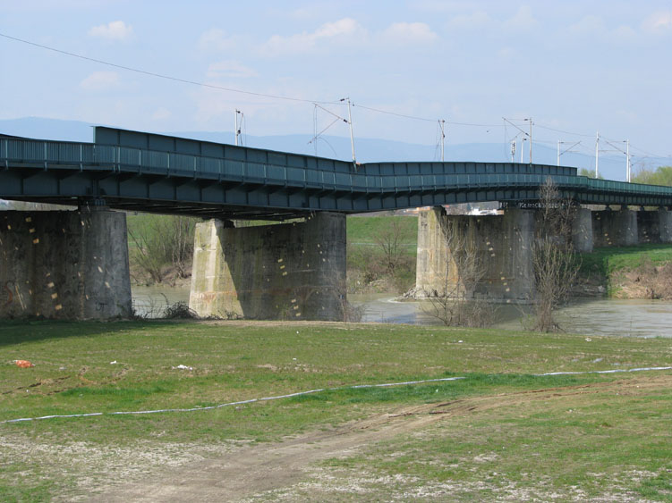 Željeznički most kod Mičevca u Zagrebu nakon propadanja potpornog stupa 30. ožujka 2009.